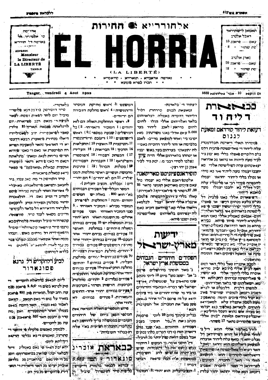 עיתון יהודי-מרוקאי שיצא לאור בטנג'יר במרוקאית יהודית וצרפתית La Liberté /אלחוררייא